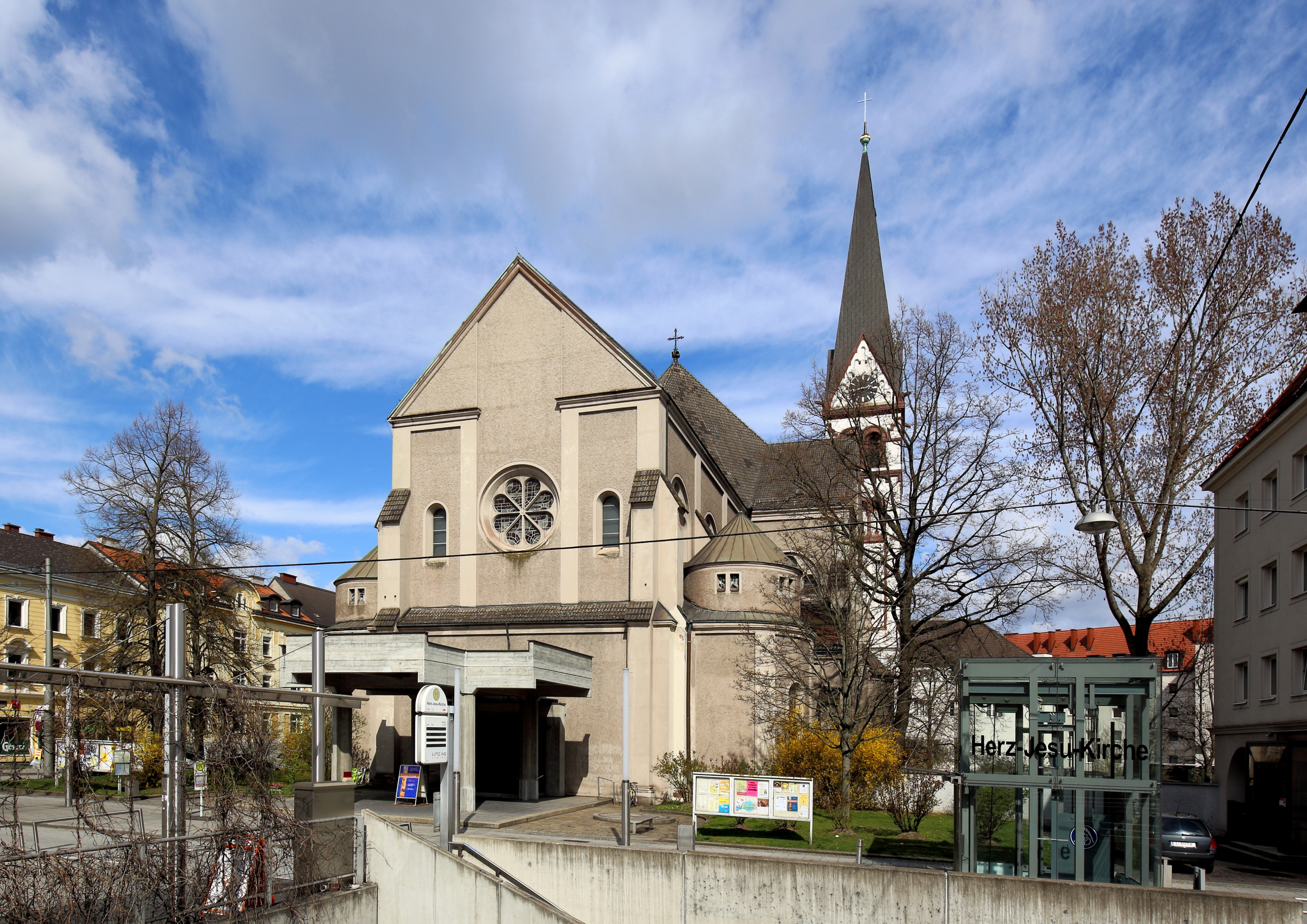 Südwestansicht der katholischen Pfarrkirche Herz-Jesu nächst Bulgariplatz (Lustenau) in der oberösterreichischen Hauptstadt Linz. Die Kirche an der Straßenecke Wienerstraße/Lissagasse ist eine romanische Stilkopie in Form einer dreischiffigen Basilika und wurde als Teil des Redemptoristen-Klosters von 1901 bis 1903 nach einem Entwurf des Architekten Raimund Jeblinger errichtet. Seit 1908 ist die Herz-Jesu-Kirche eine Pfarrkirche, die mit 15. Oktober 2009 unter Denkmalschutz gestellt wurde.